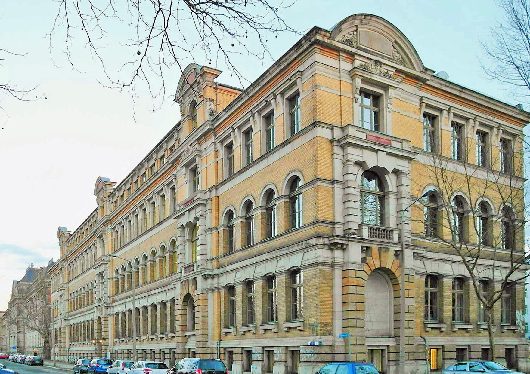 Hochschulgebäude